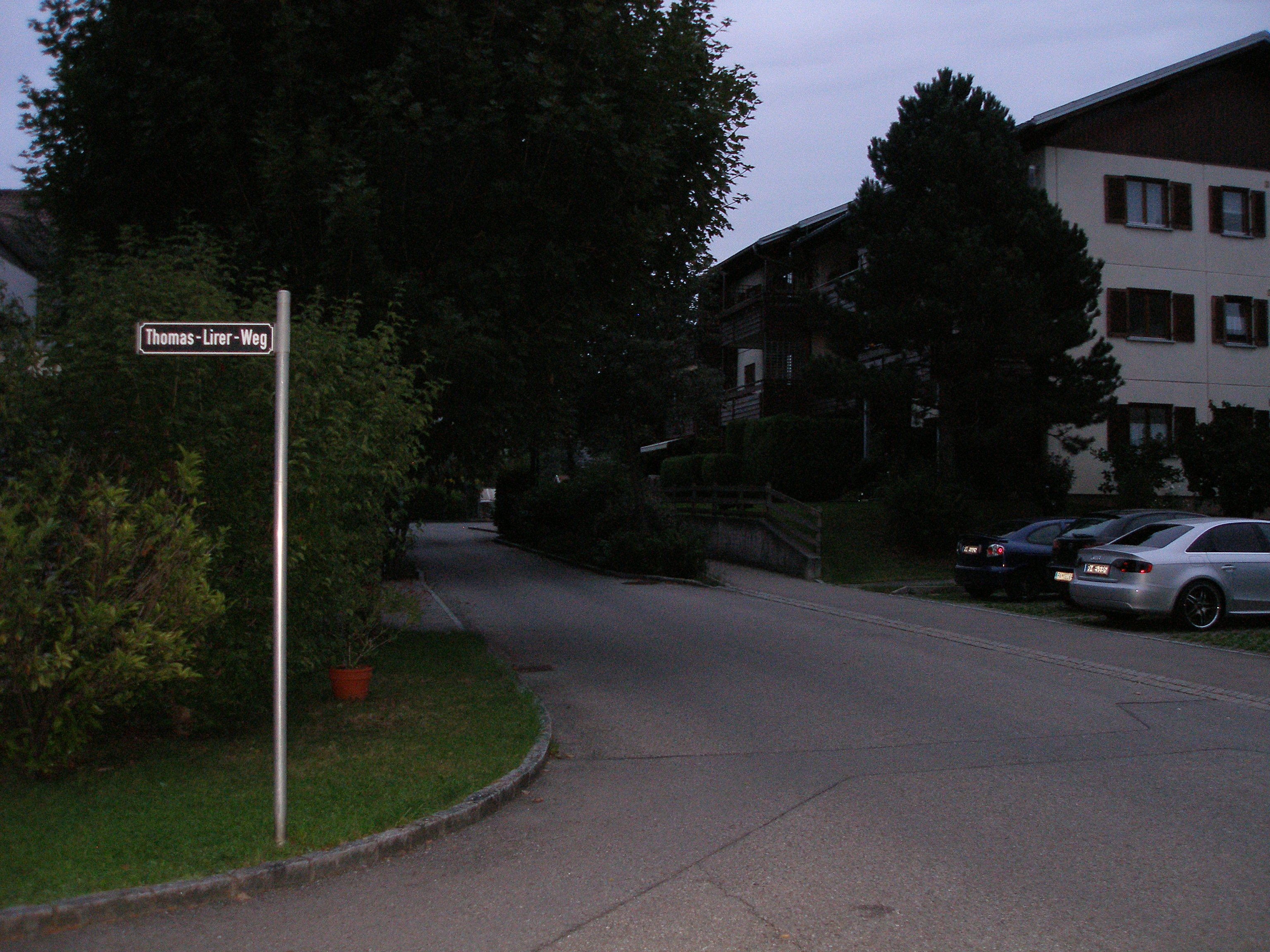 Thomas-Lirer-Weg in Götzis